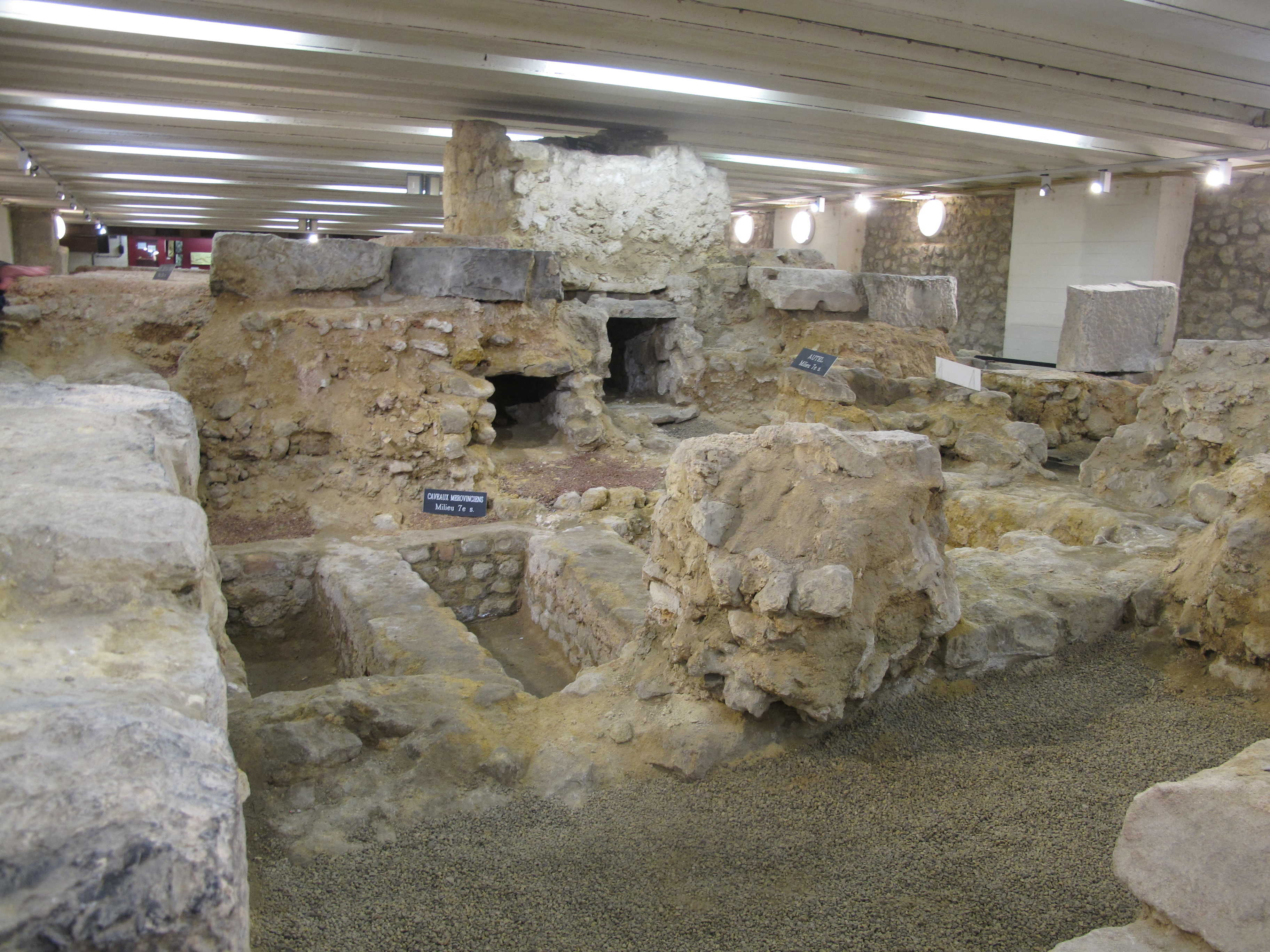 Ausgrabungsebenen unter der Stiftskirche St. Gertrud mit den Daten der Bestattungen. Freigelegt nach den Zerstörungen 1946